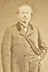 Colonel Charles Grégoire Léonard Peyssard 40e de ligne